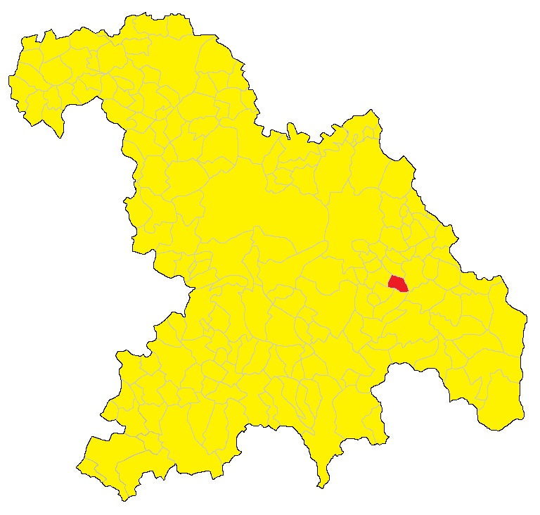 Mappa del comune di Castellania (AL)